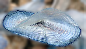 Velella sp.